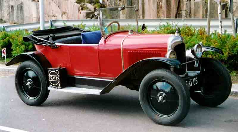 Citroen 5 CV Torpedo